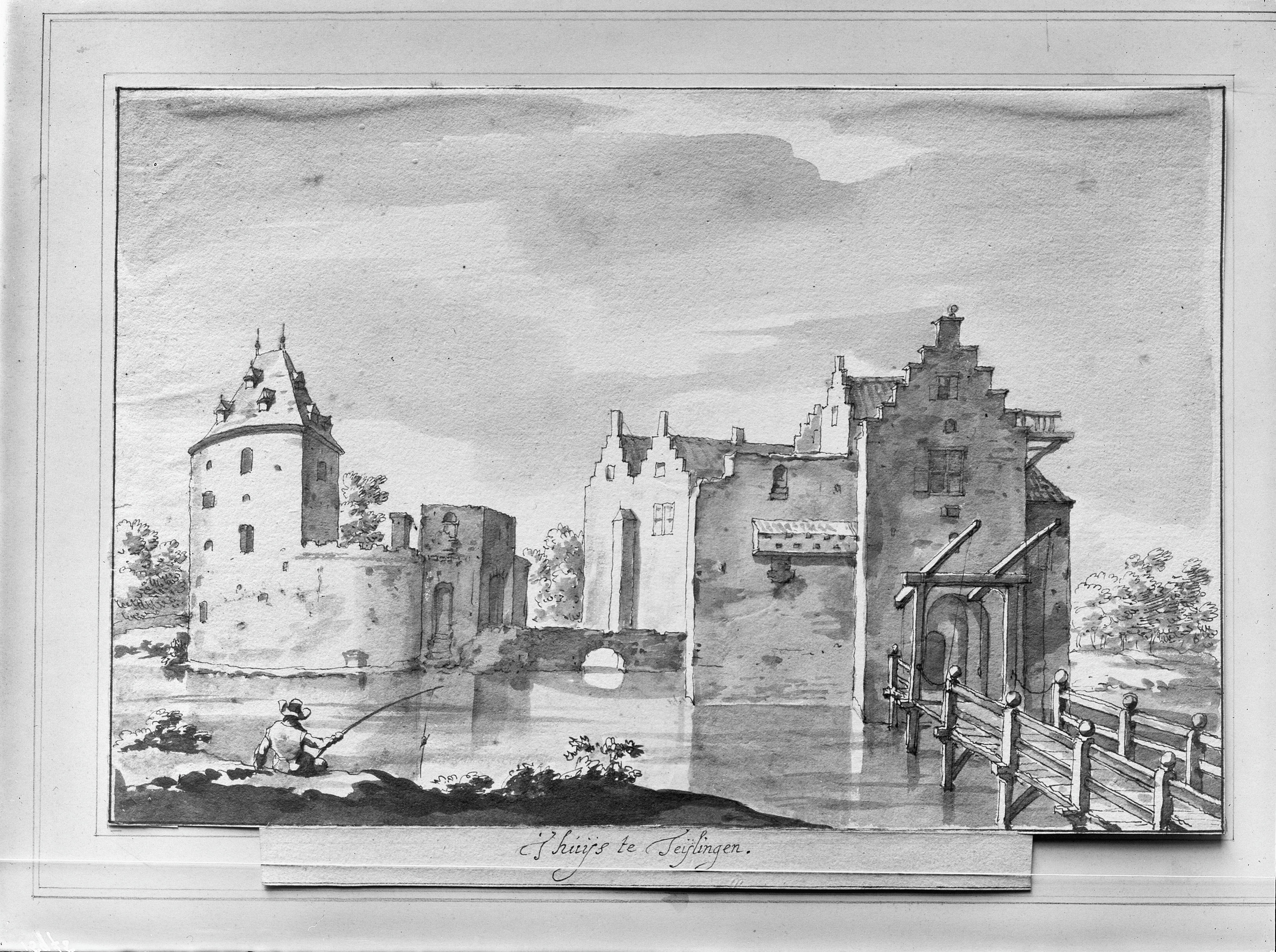 Ruïne van Teylingen: naar sepiatekening door Bisschop in het Museum Teyler Haarlem